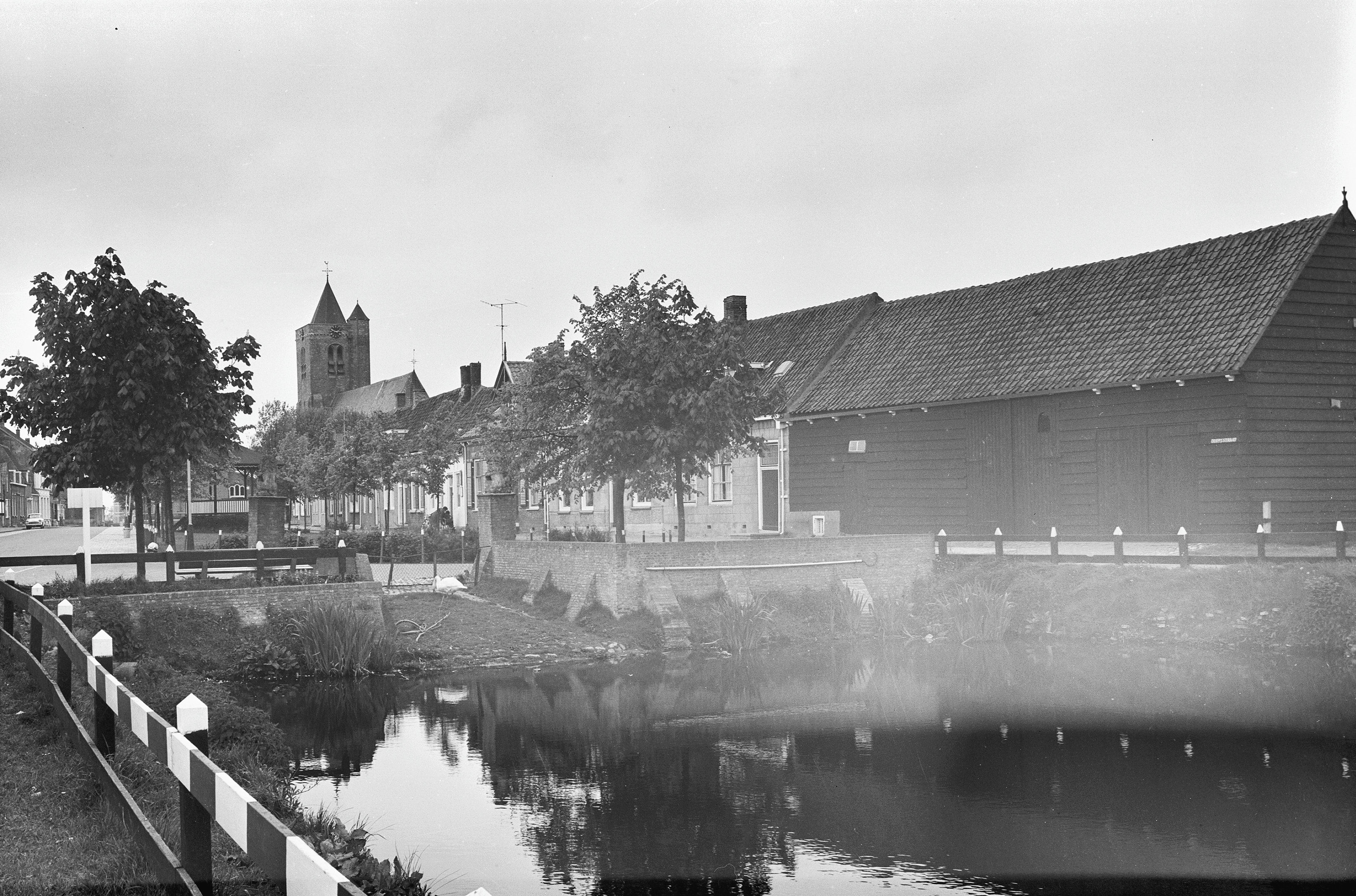 overzicht